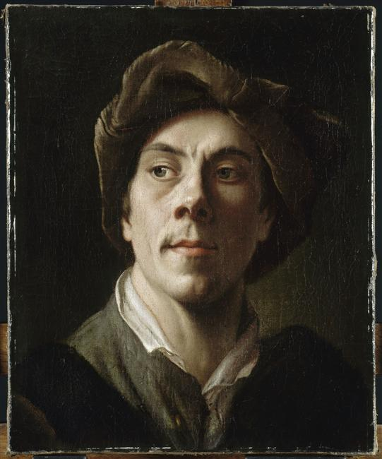 Christian Seybold (1695–1768), deutscher Maler. Selbstporträt.